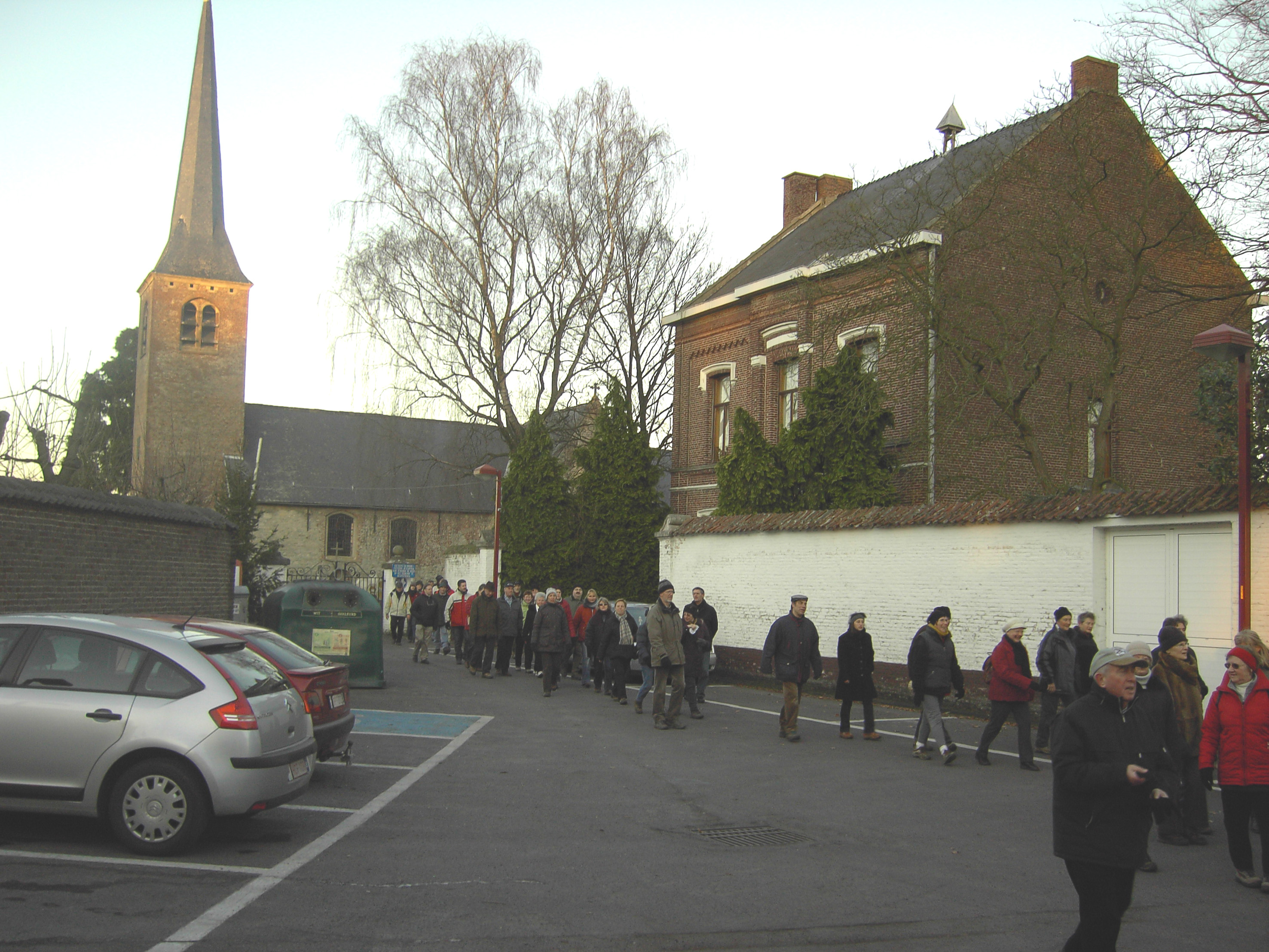 Parochiekerk Sint-Stephanus en Pastorie - Melsenstraat - Melsen - Merelbeke - Oost-Vlaanderen - België.